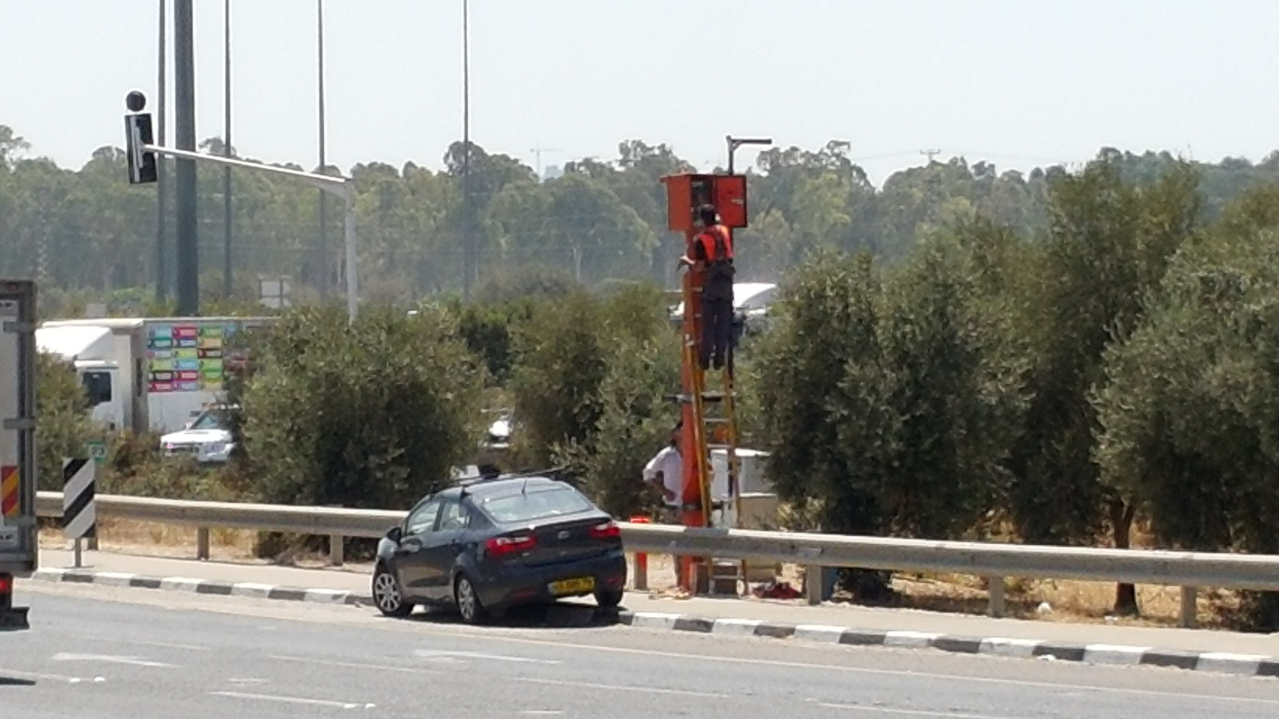 התקנת מצלמה לאכיפת חוקי התנועה